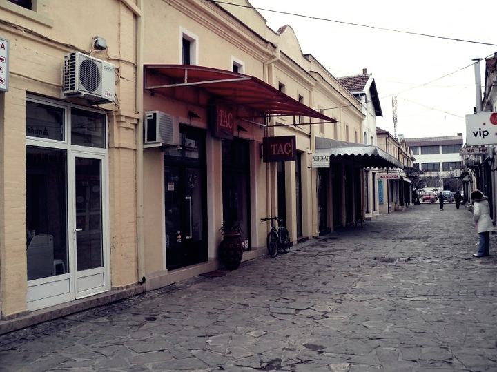 Град Гевгелија, Македонија 18